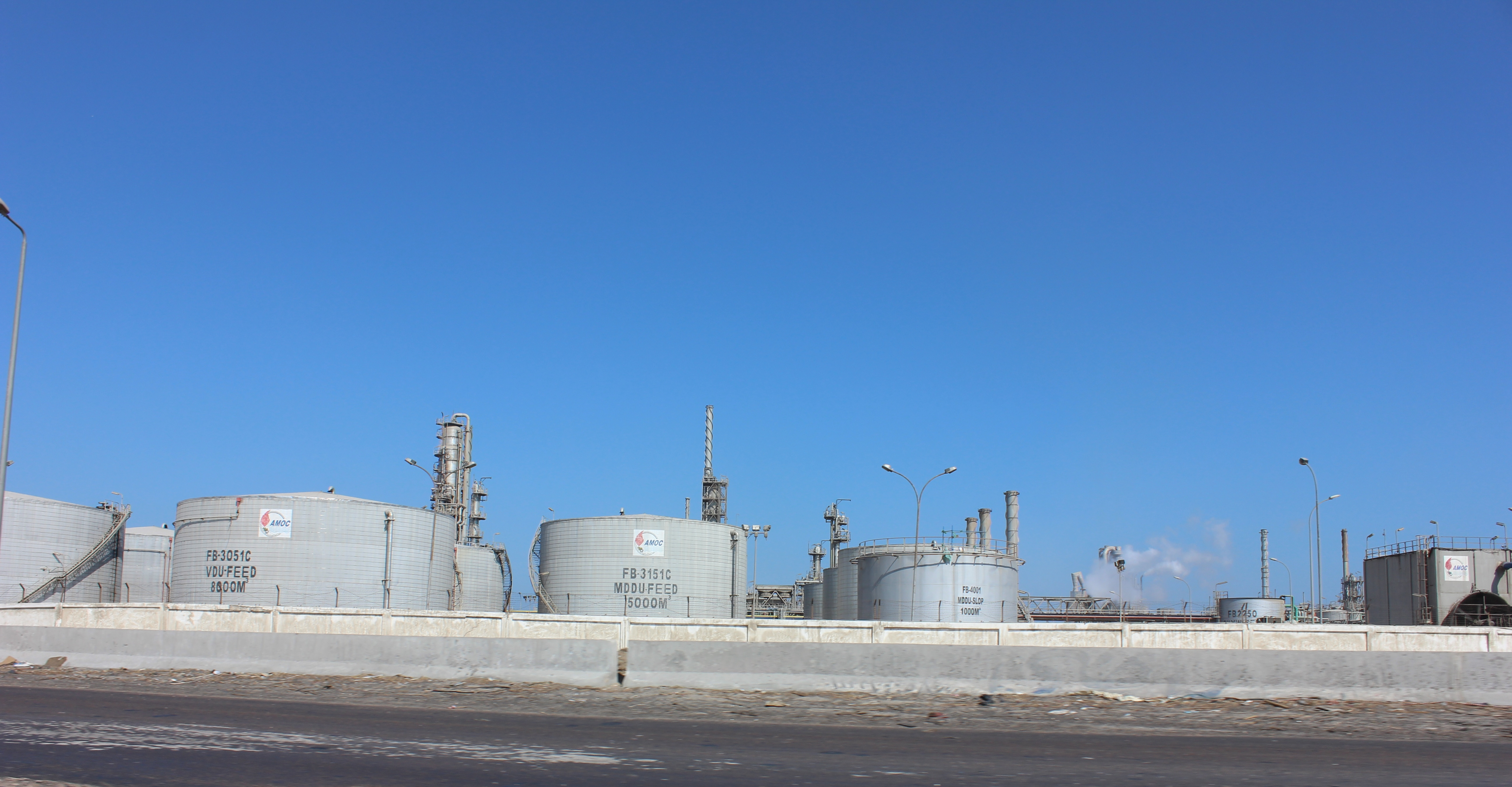 الطريق الدولي الساحلي بالإسكندرية.